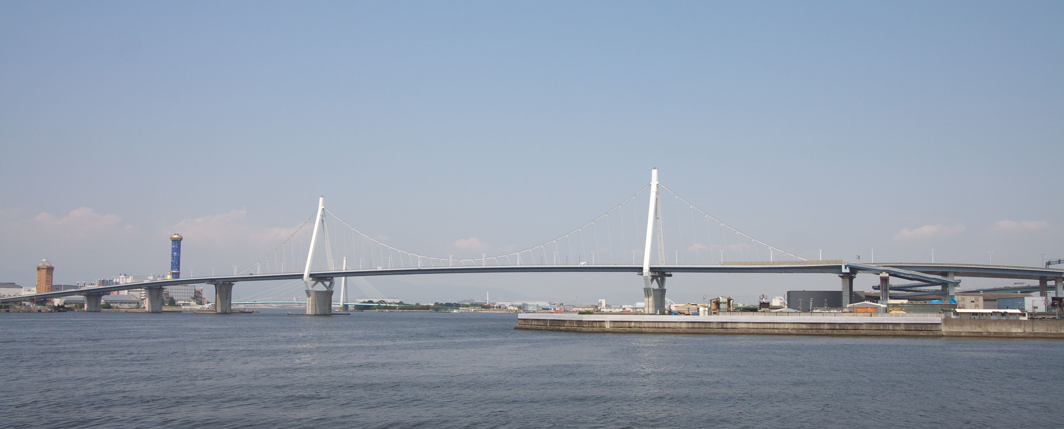 此花大橋（大阪市, 日本） / Konohana Ohashi Bridge Osaka, Japan